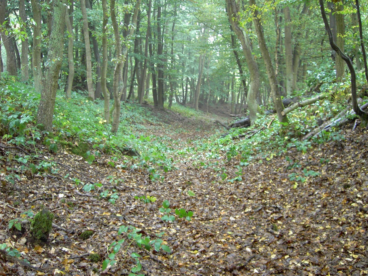 Das Bild zeigt Wall und Graben vom nördlichen Eingang aus gesehen in Richtung Osten Goloring